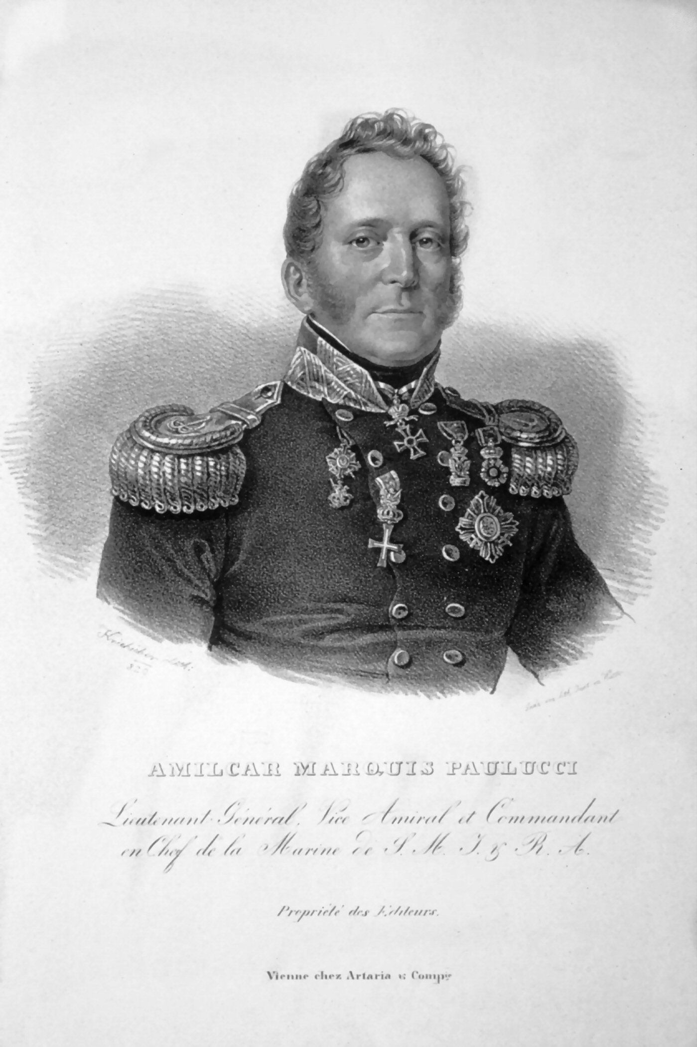 Amilcare Marchese Paulucci delle Roncole (1773-1845), österreichischer Admiral. Lithographie von Josef Kriehuber, 1829